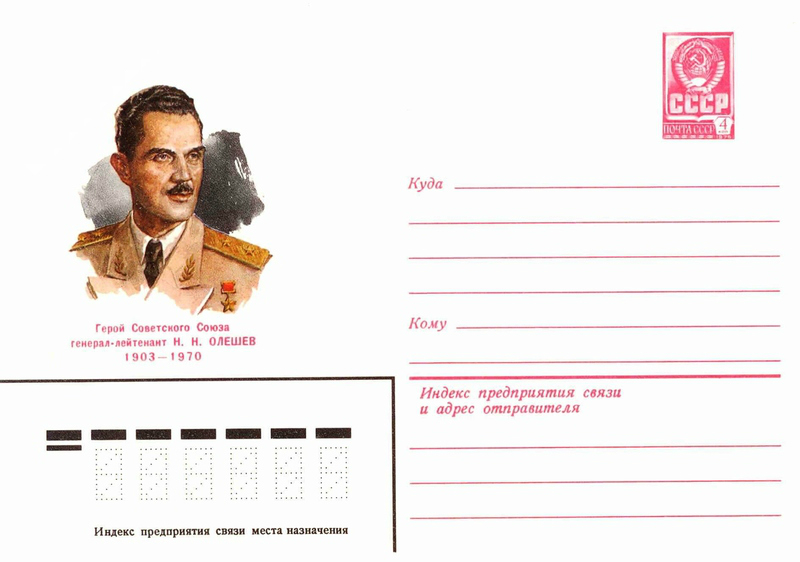 Художественные маркированные конверты 1980 года.